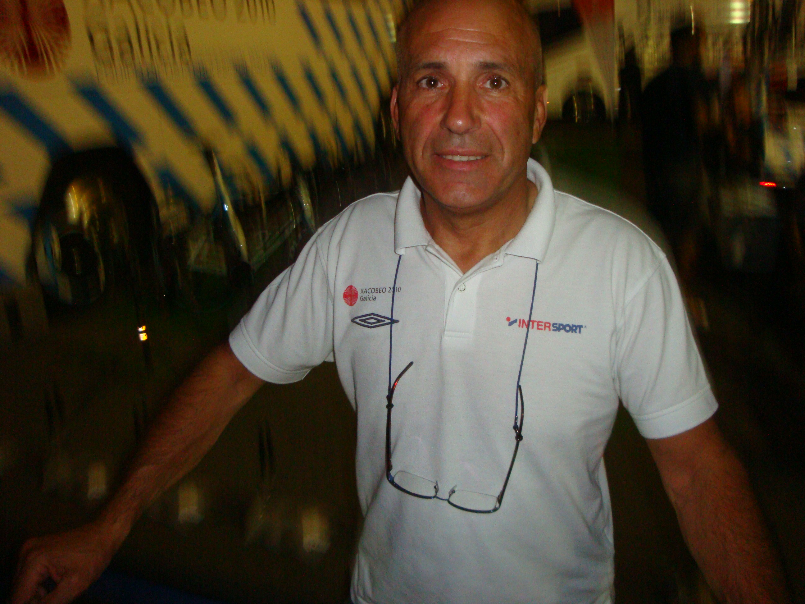 Alvaro Pino director del equipo Xacobeo Galicia de la Vuelta a España 2010